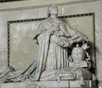 Orant de mgr Parisis à la cathédrale d'Arras